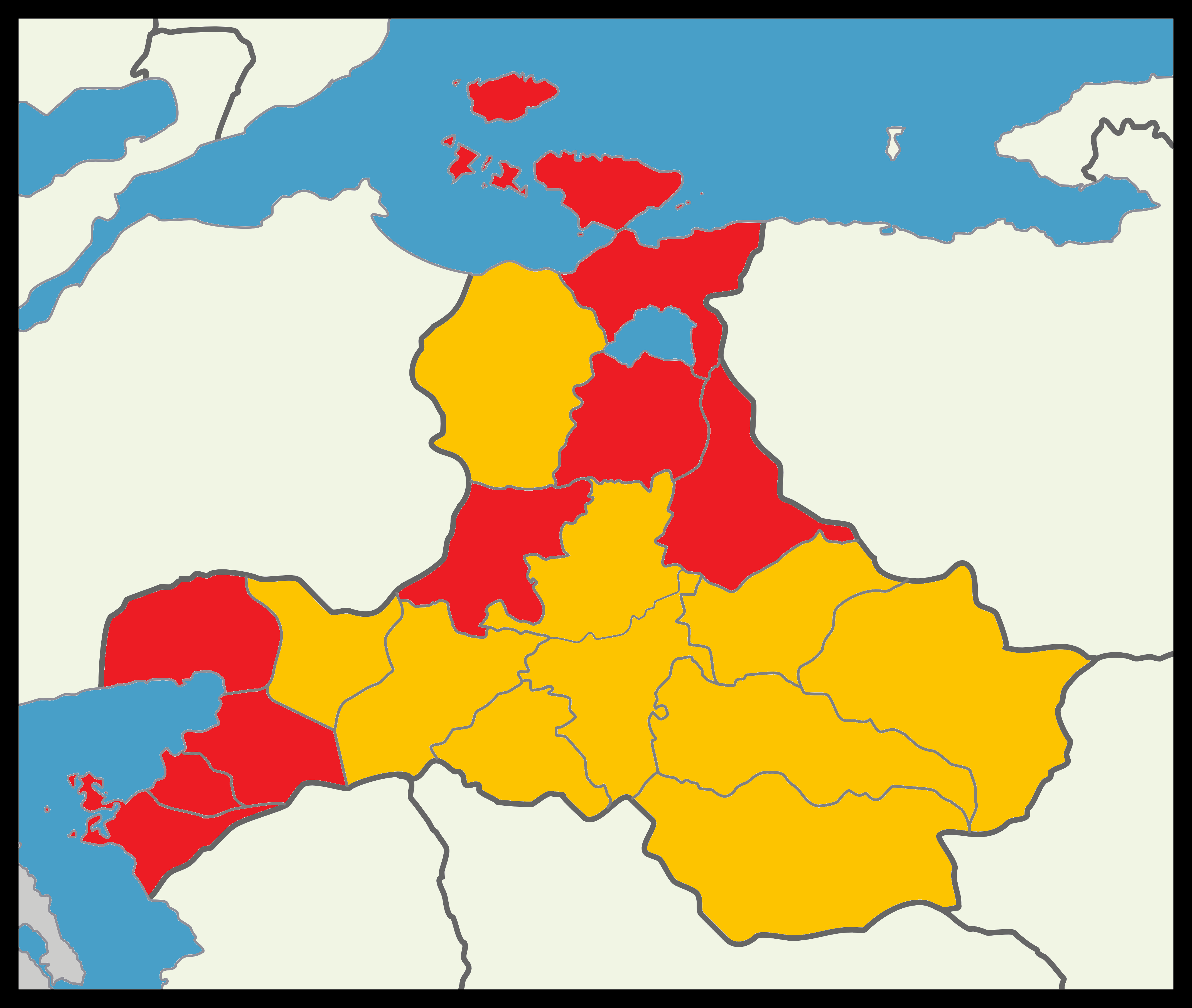 Balıkesir'de 2014 Türkiye cumhurbaşkanlığı seçimi